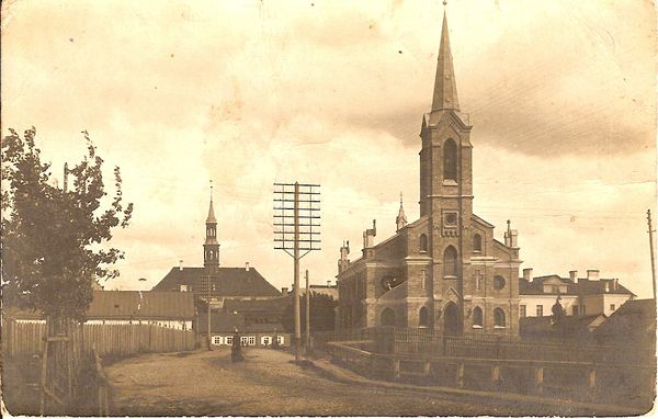 Narva Peetri kirik ca 1915.aastal